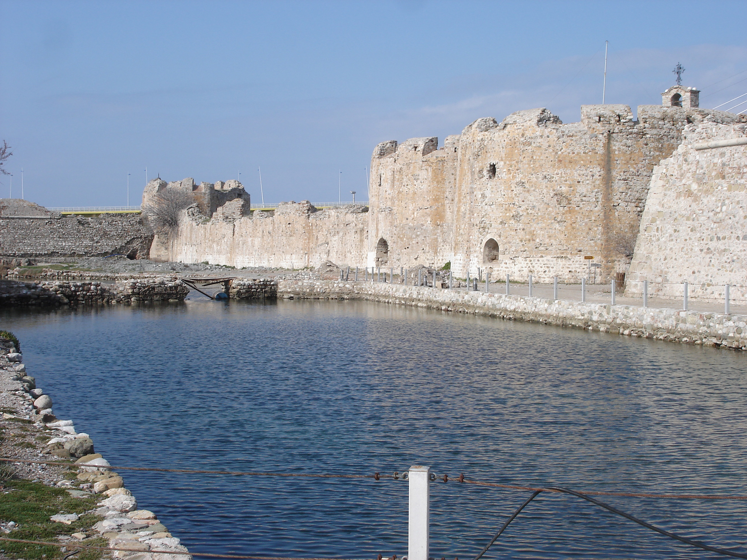 Rio castle Greece Το κάστρο του Ρίου, Οθωμανικό χερσαίο τείχος και η τάφρος